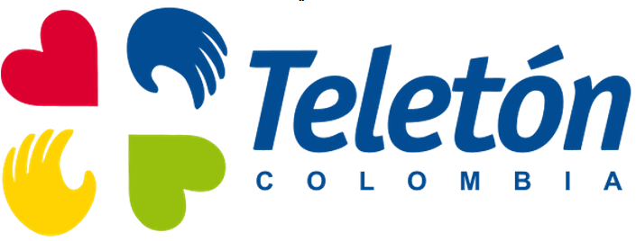 Logo Teletón Colombia 2011